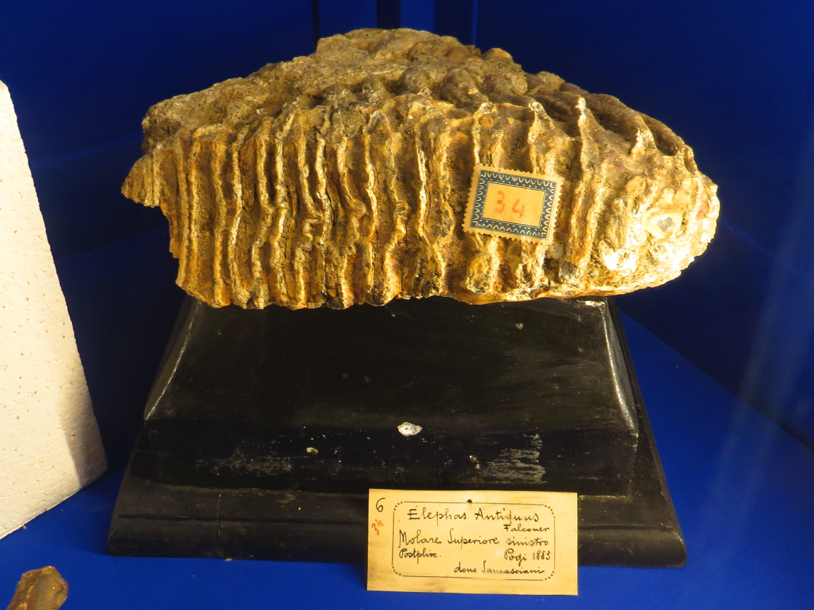 Fossil - Took the picture at Museo Paleontologico di Montevarchi